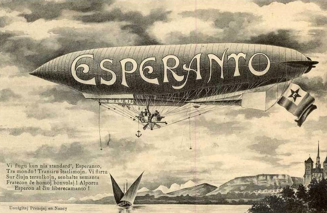 Antikva esperanta poŝtkarto kun Zepelino, Nancy - Francio